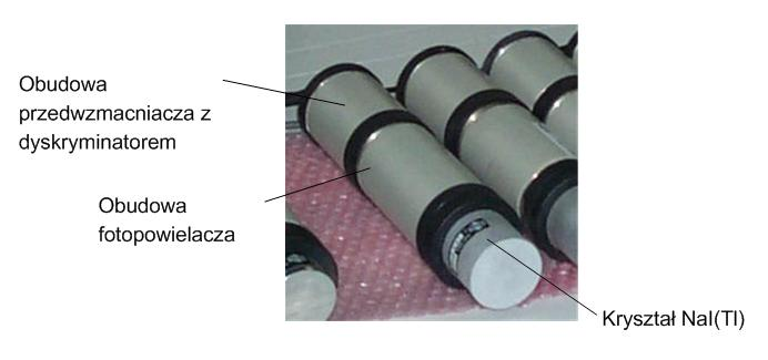 Sonda scyntylacyjna stosowana w badaniach izotopowych na Wydziale Fizyki i Informatyki Stosowanej AGH w Krakowie.